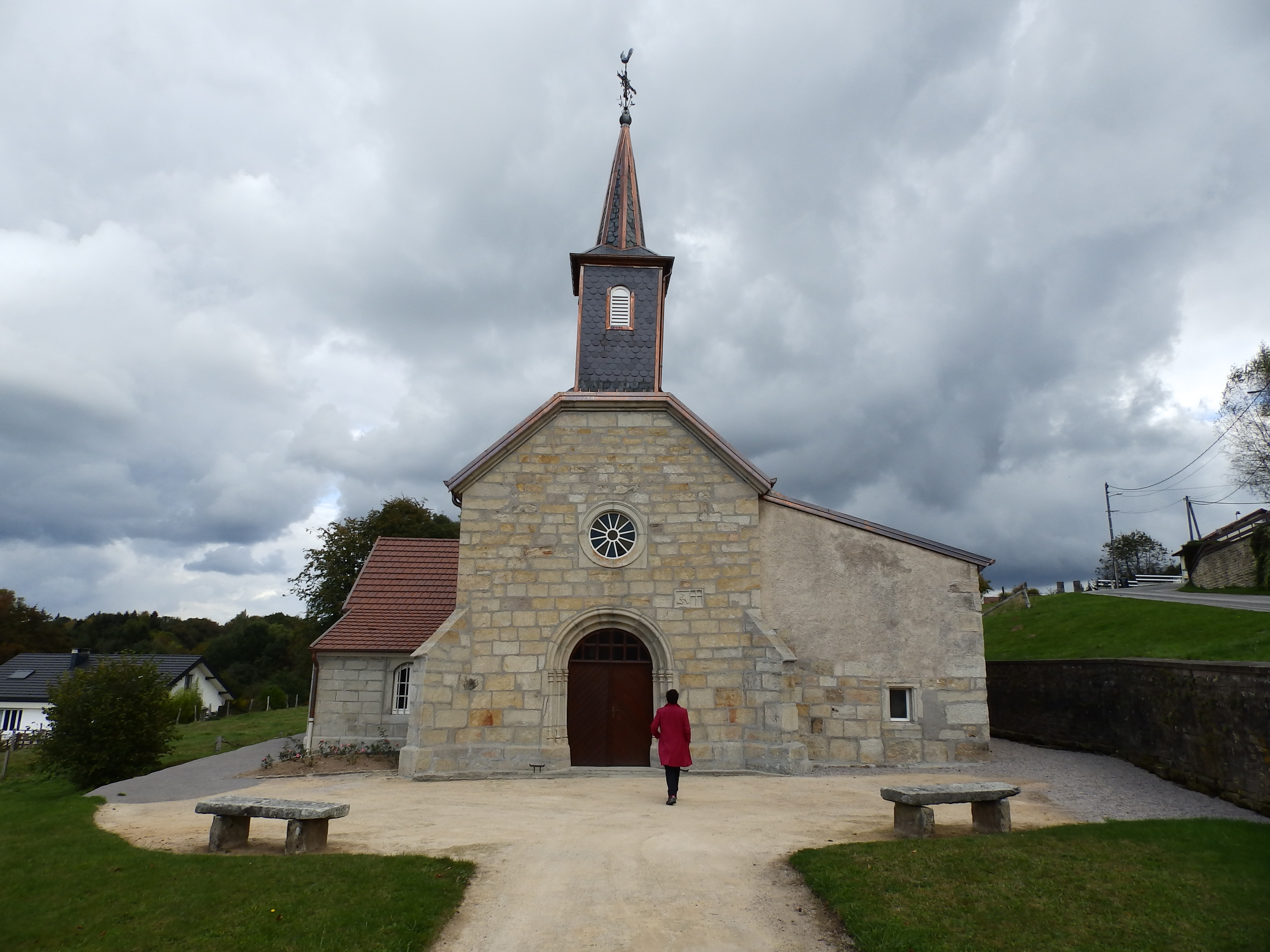 Chapelle Notre-Dame du Chardonneret de Thiélouze (commune d'Uzemain dans le département des Vosges (France) : façade